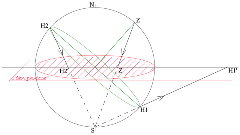 Schéma de géométrie pour appuyer la définition de projection stéréographique. (é‰tienne HAOUY, automne 2005)